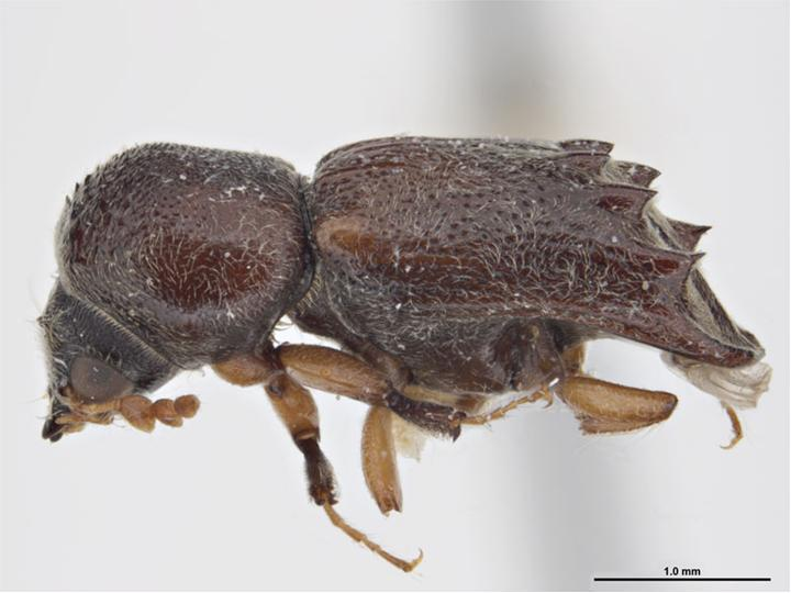 Xylobiops texanus.